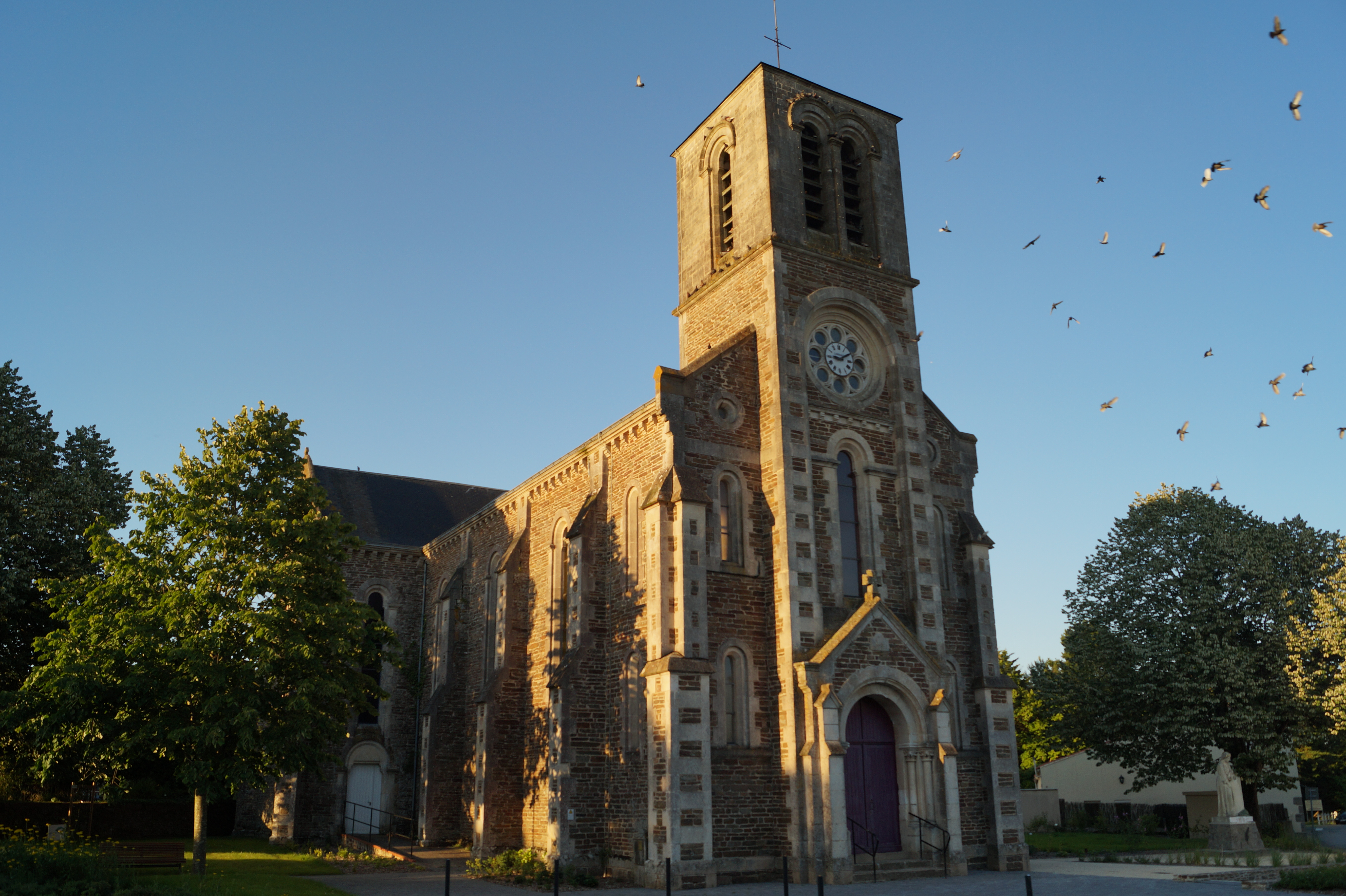 L’église Saint-Médard de Rosnay depuis la rue du Fief.